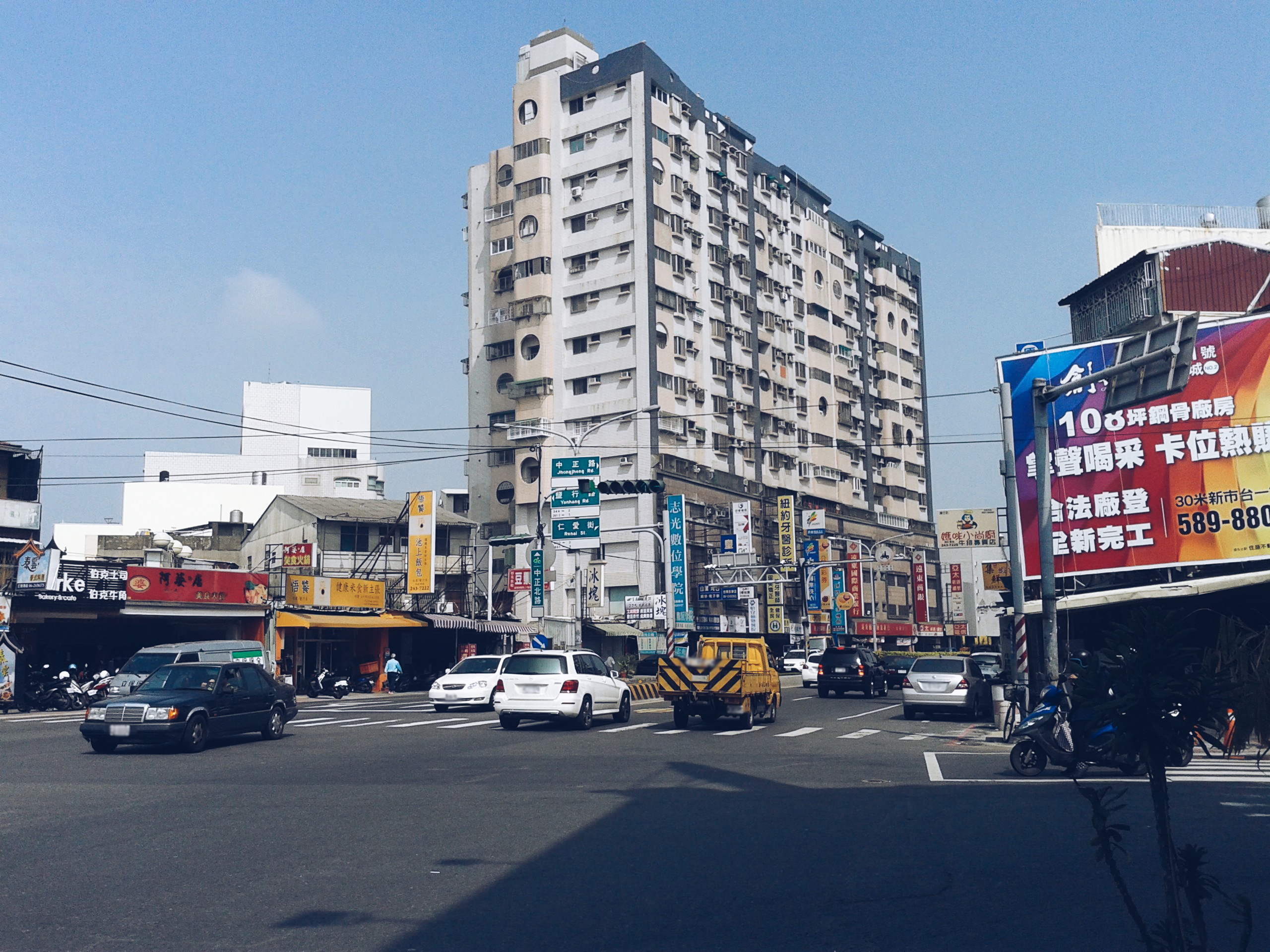 台1線永康區中正南路進入鹽行地區，經與中正路的交會路口後和中正北路連接。圖為鹽行一隅。